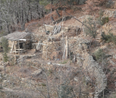 tour ronde au centre et atelier poterie à gauche au milieu de l'enceinte.